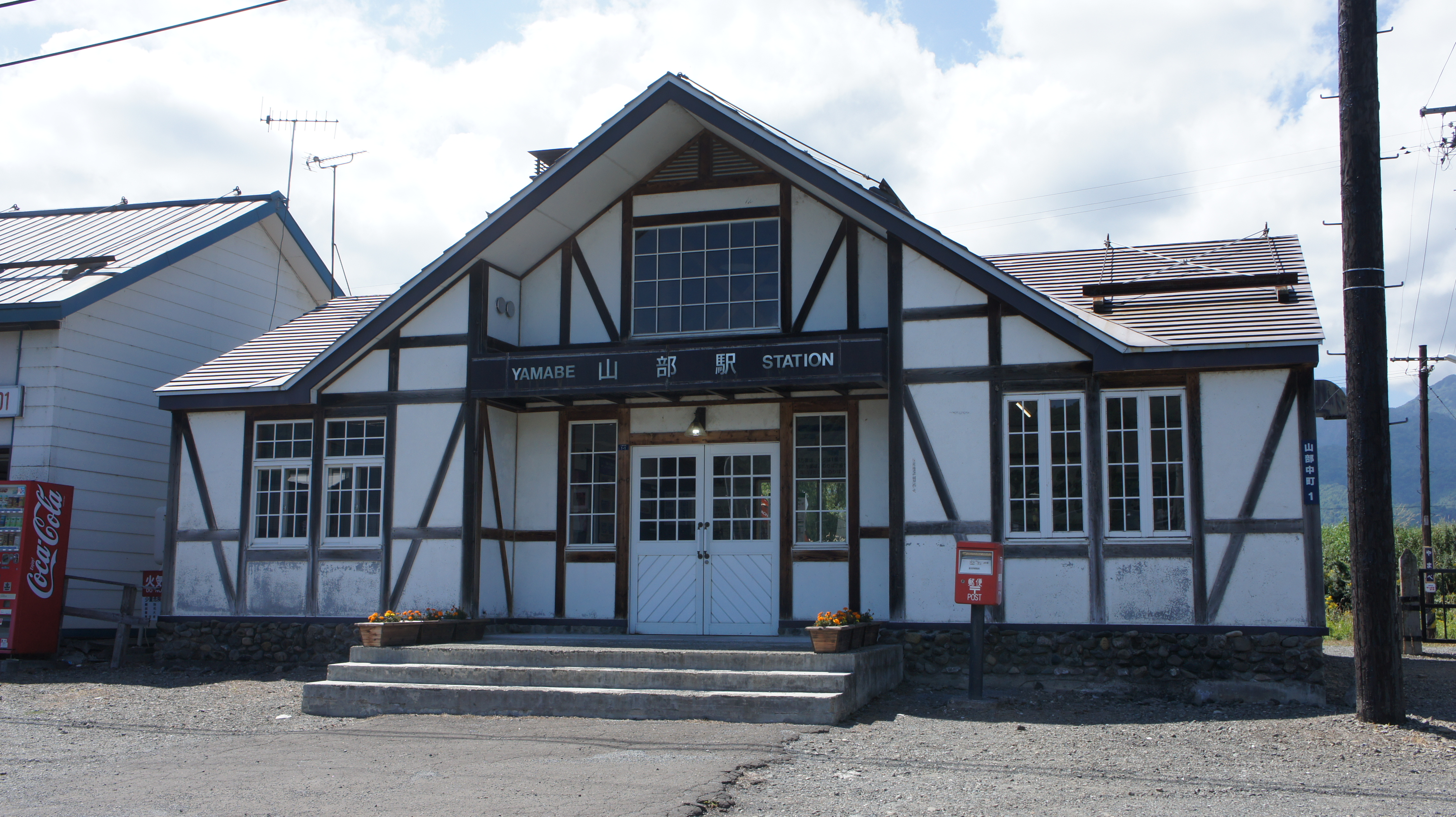 JR根室本線・山部駅の駅舎